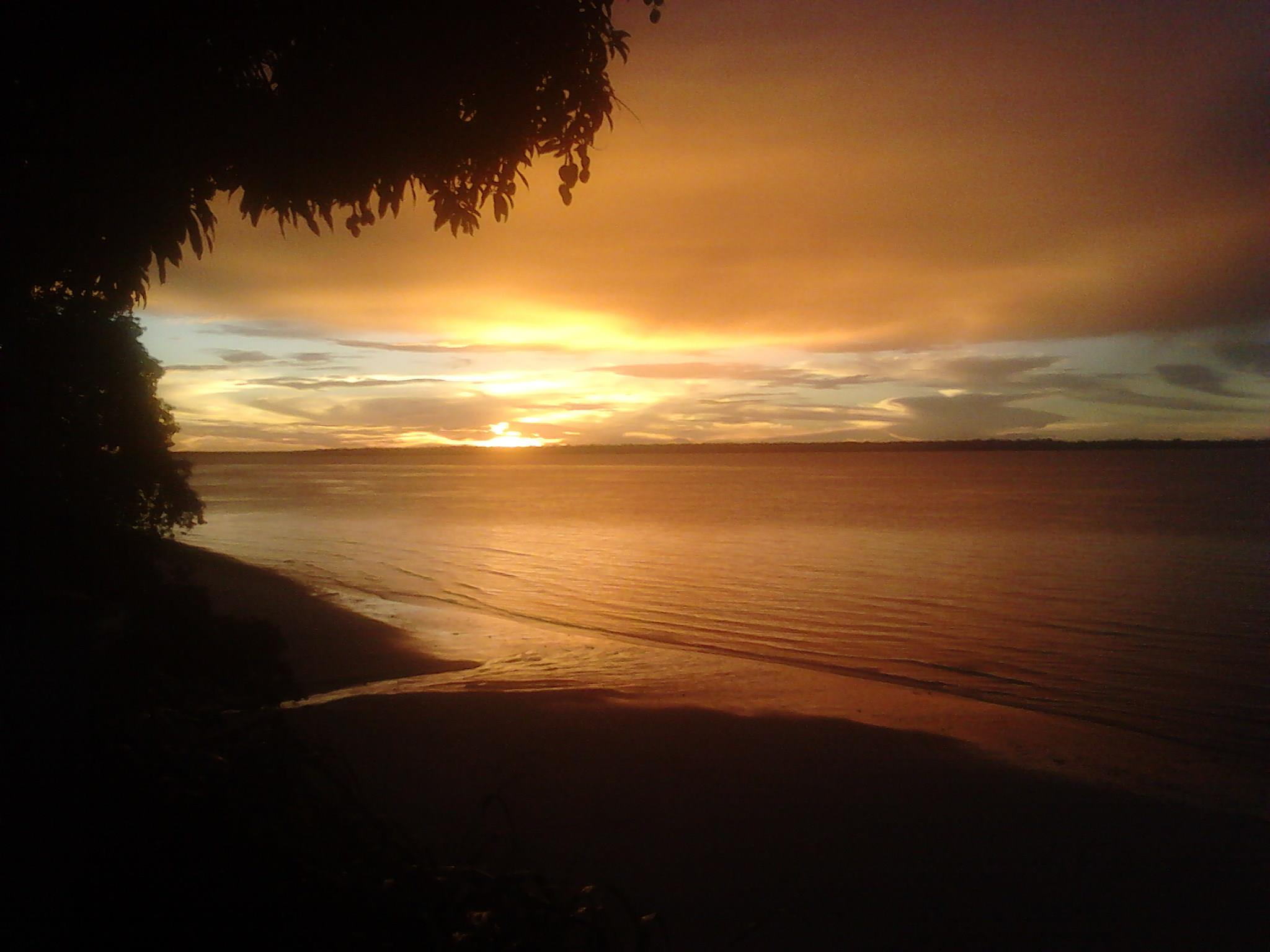 Por do sol - Praia dos Artístas - Caratateua.